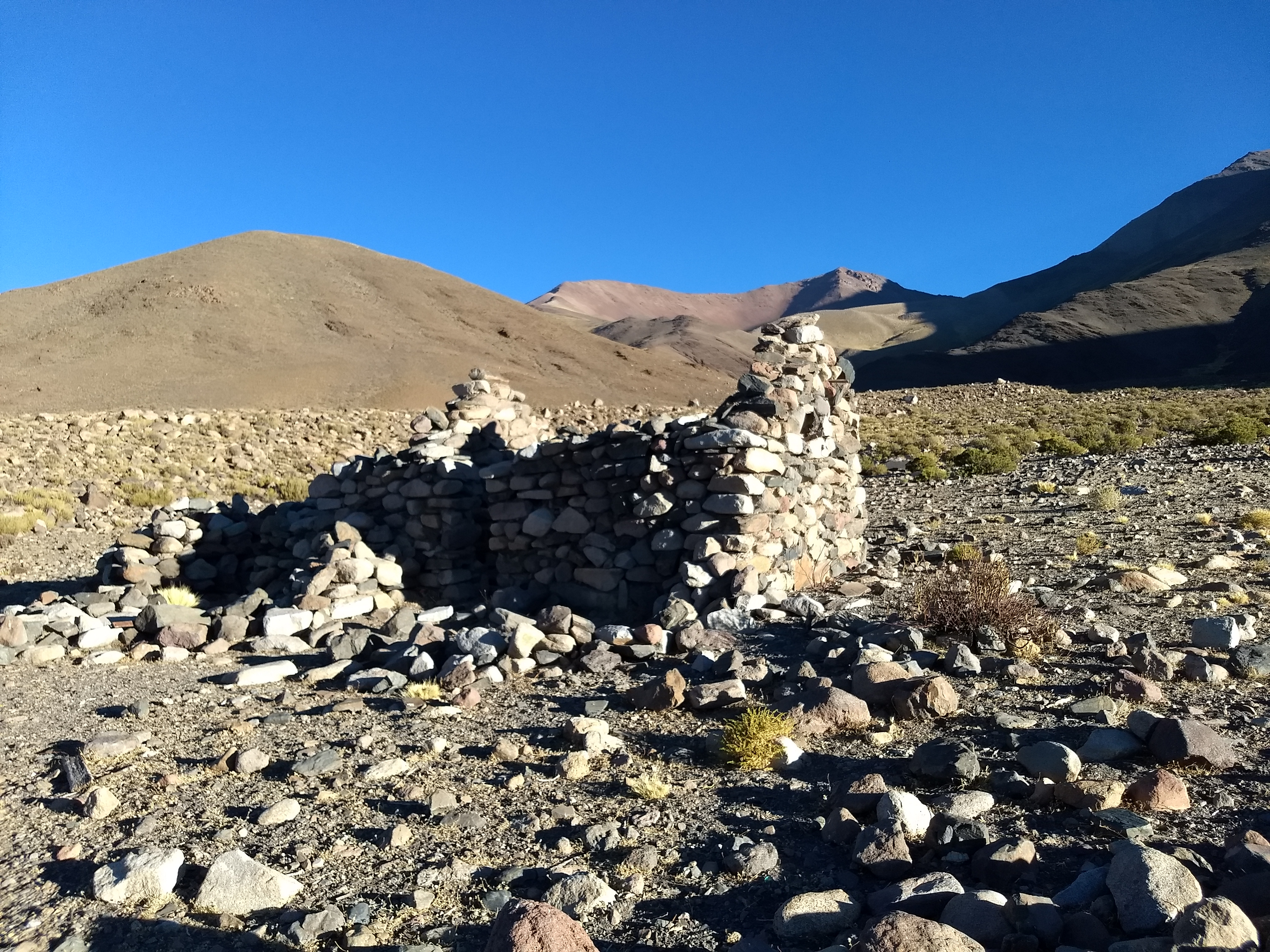 cultural. Los conjuntos